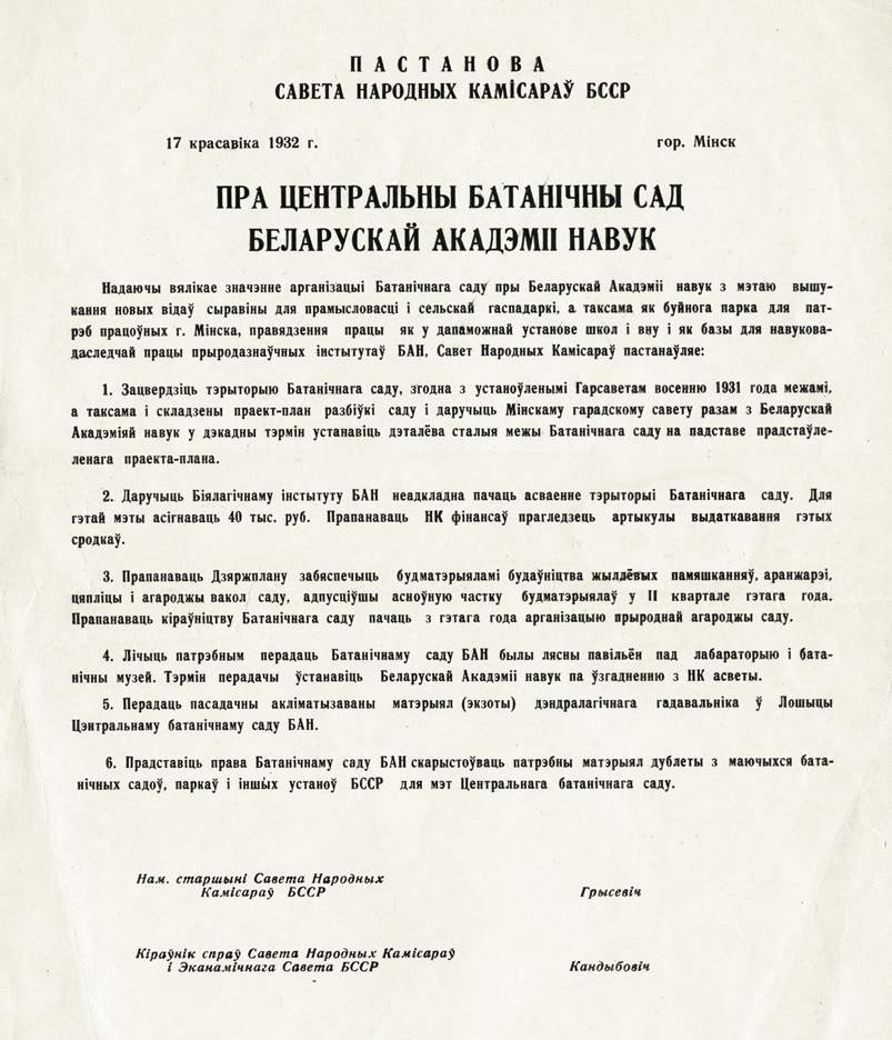 Пастанова Савета Народных Камісараў БССР. Пра Цэнтральный батанічны сад Беларускай акадэміі навук